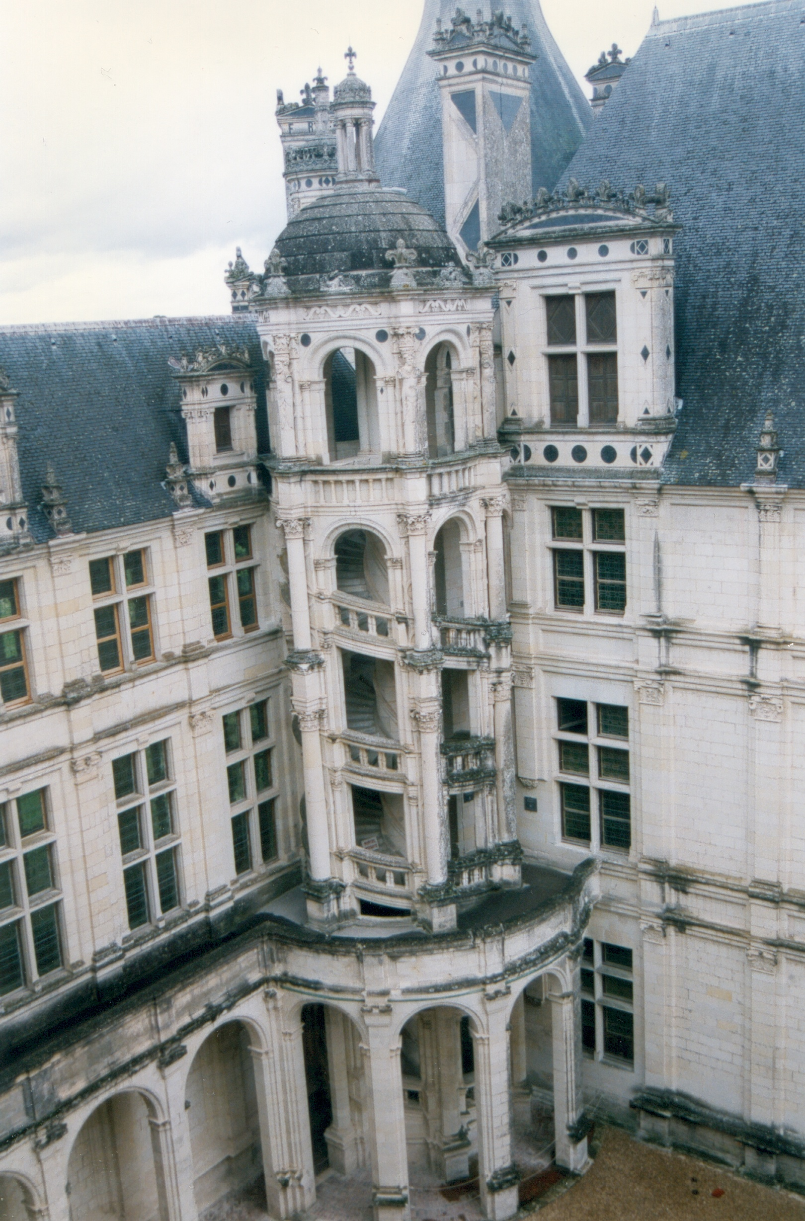 France Loir-et-Cher Château de Chambord Photographie prise par GIRAUD Patrick